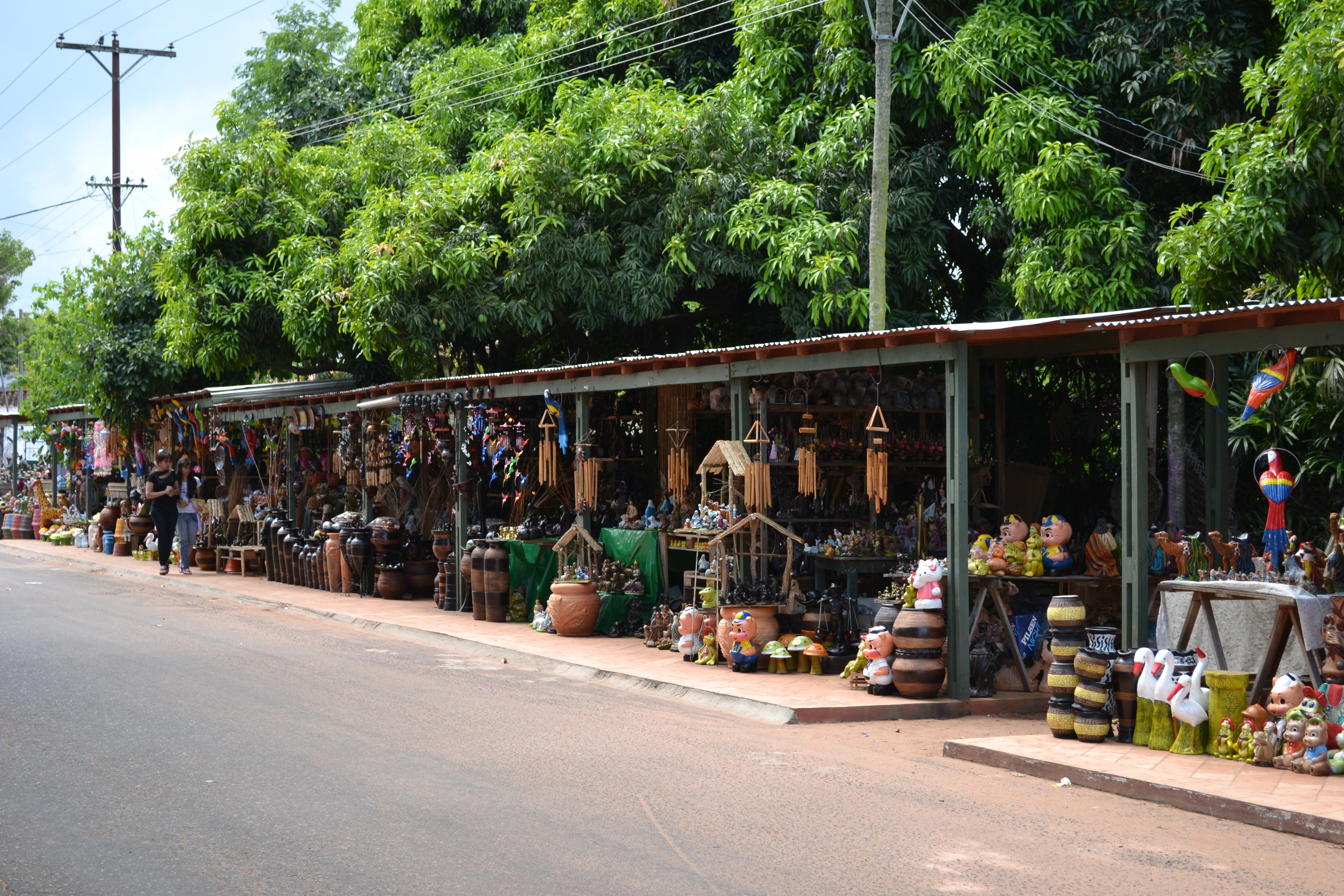 Töpferstrasse Gobernada Irala Aregua